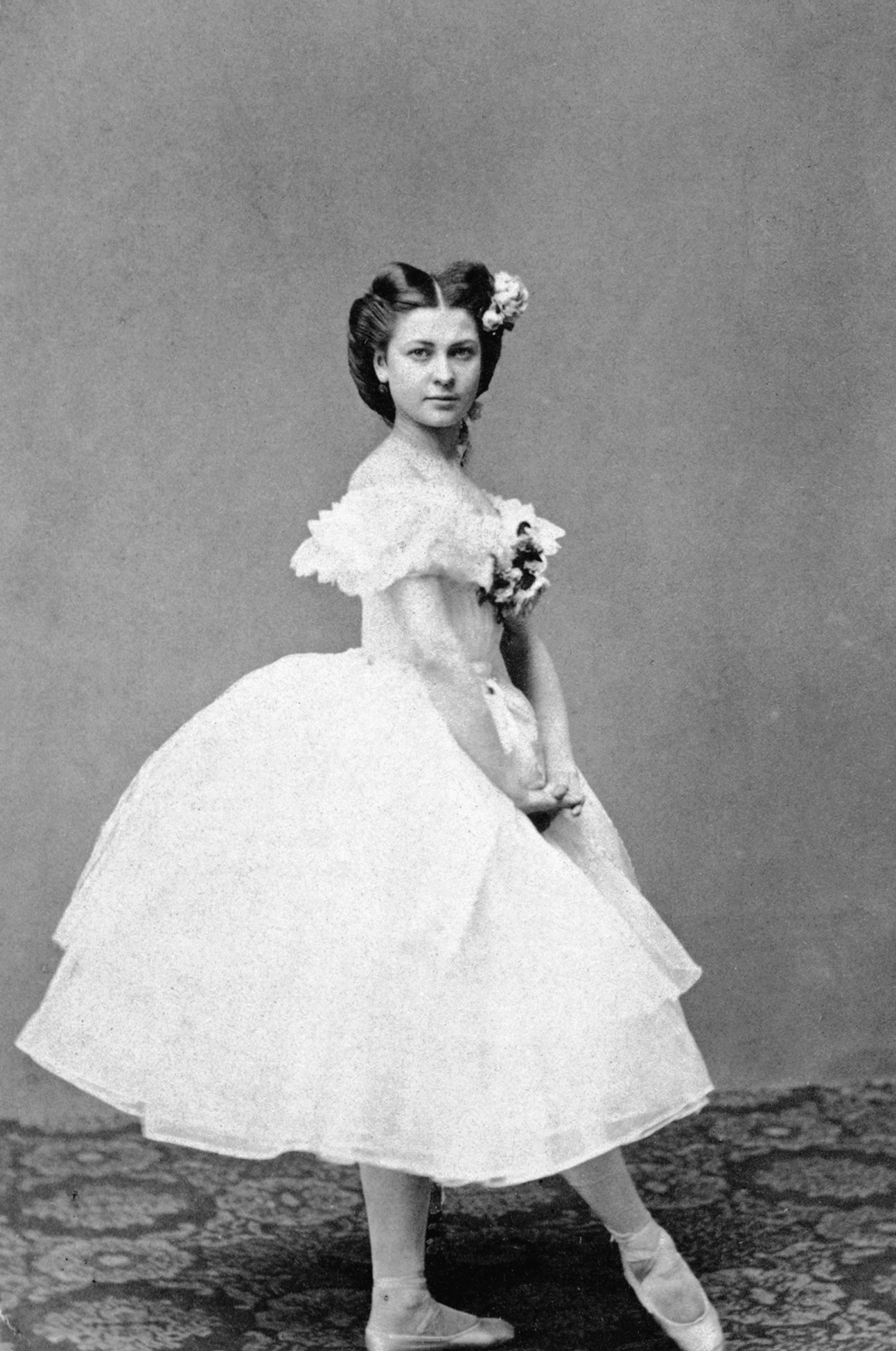 Amanda Forsberg, dansare vid Kungliga teatern 1863